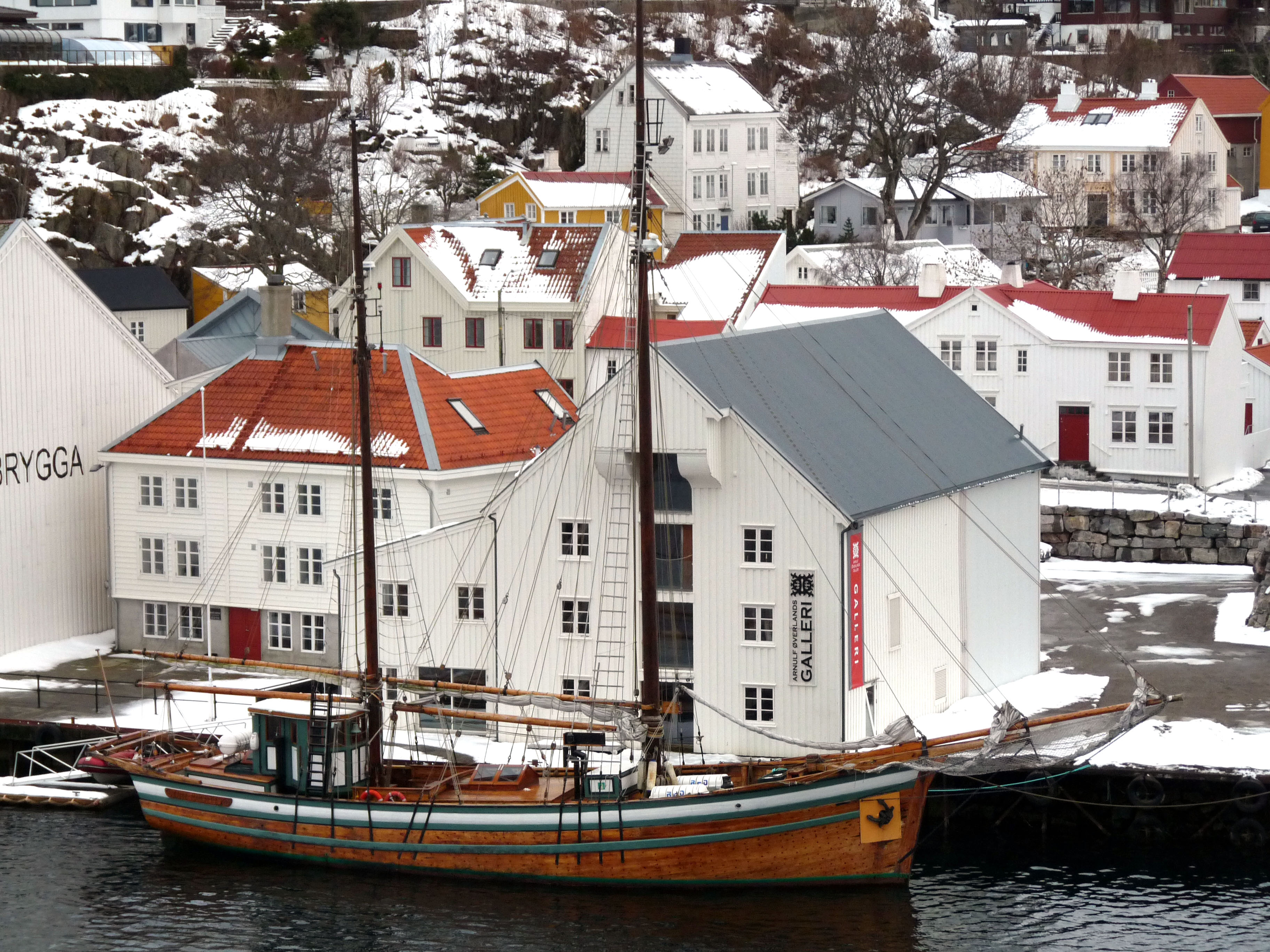 21 Kristiansund